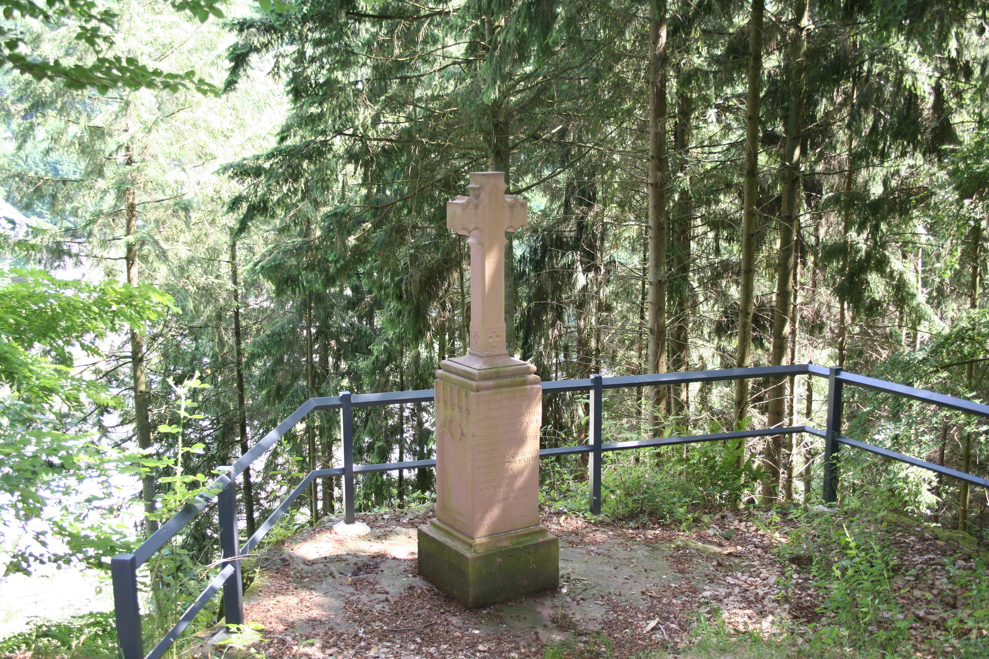 Eselslay mit Eselskreuz in Auw an der Kyll, Rheinland-Pfalz, Deutschland